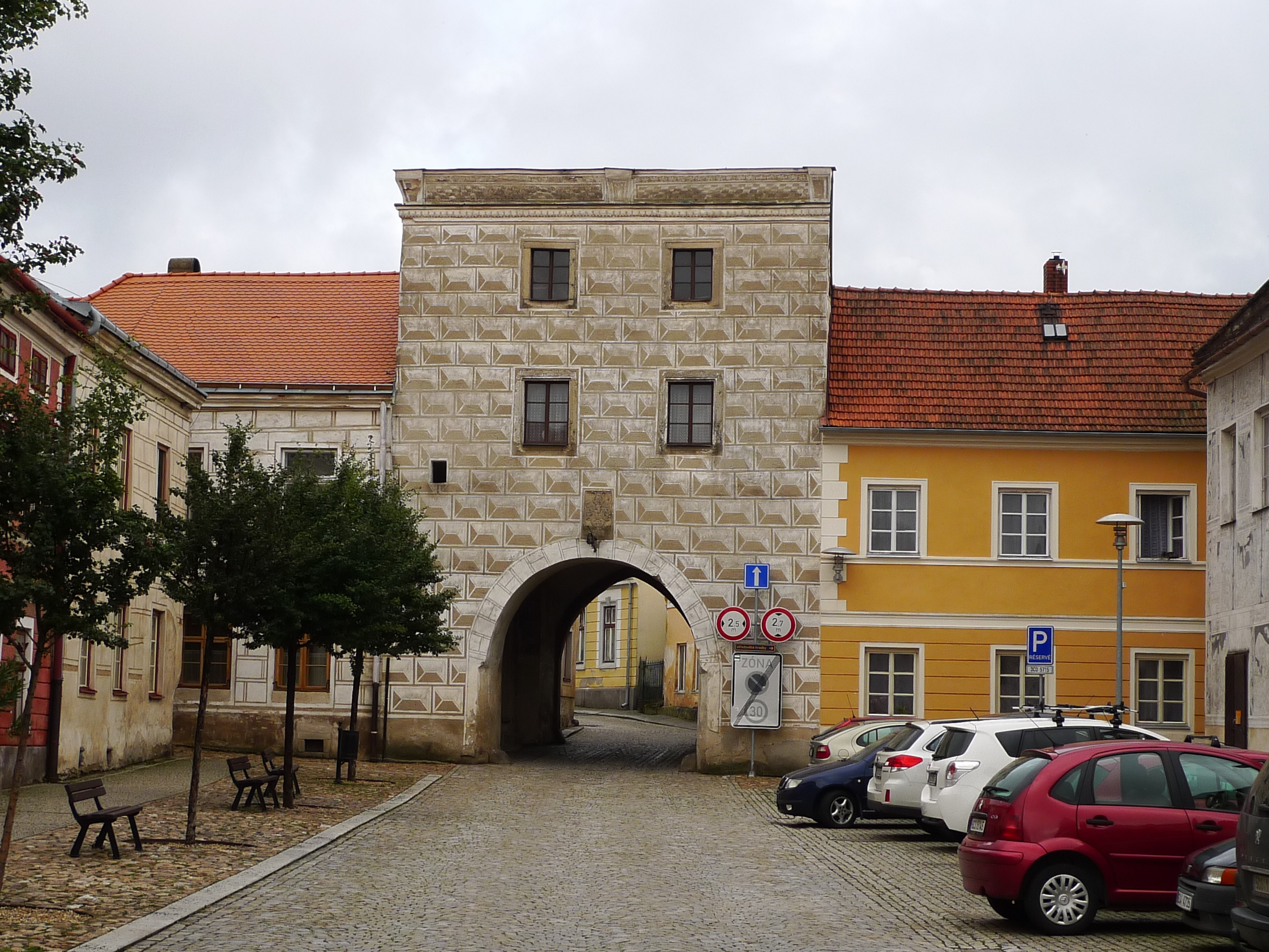 Městské opevnění (Slavonice), Slavonice.